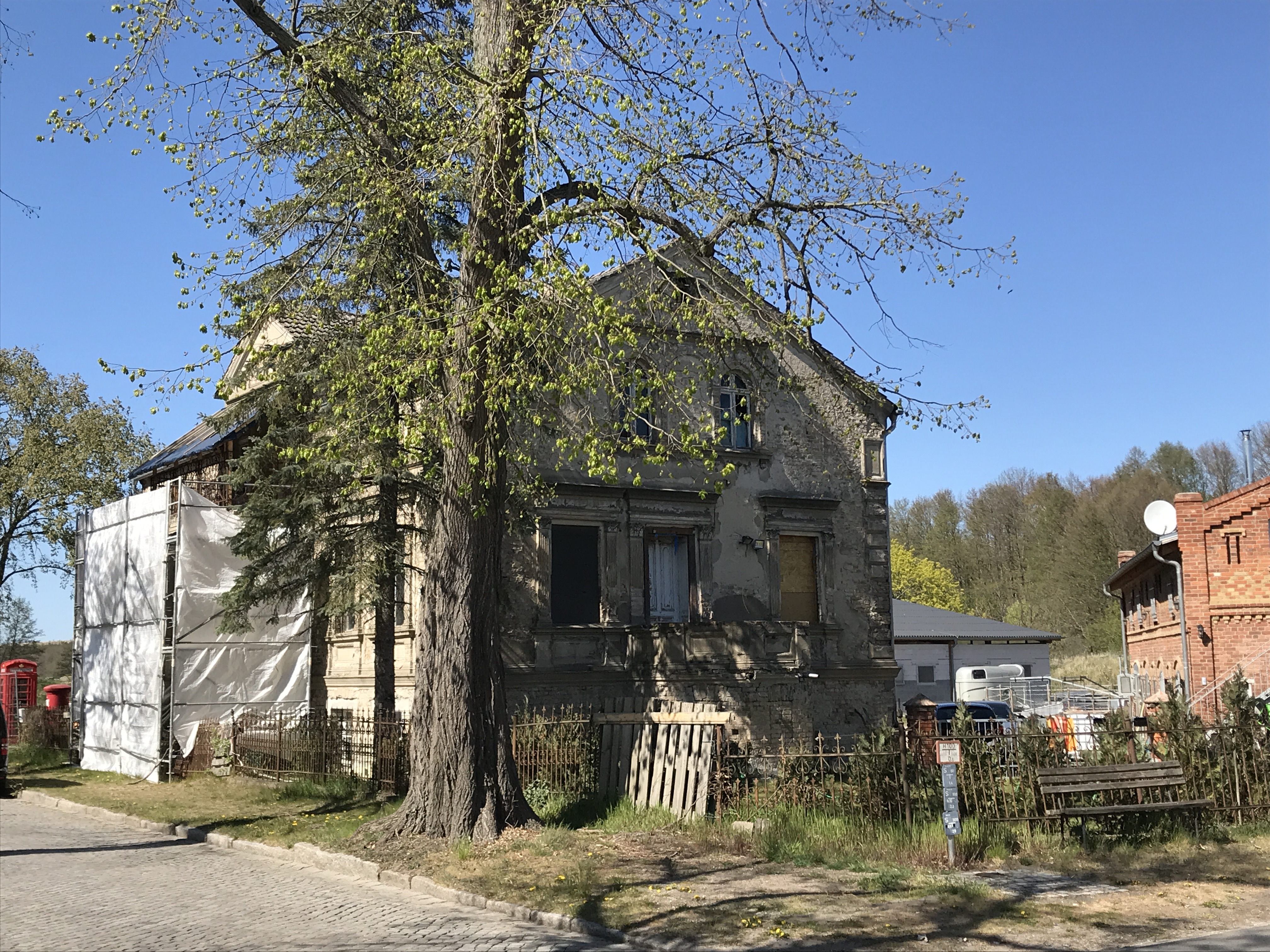 Denkmalgeschütztes Haus in Zossen-Kallinchen in der Hauptstraße 1